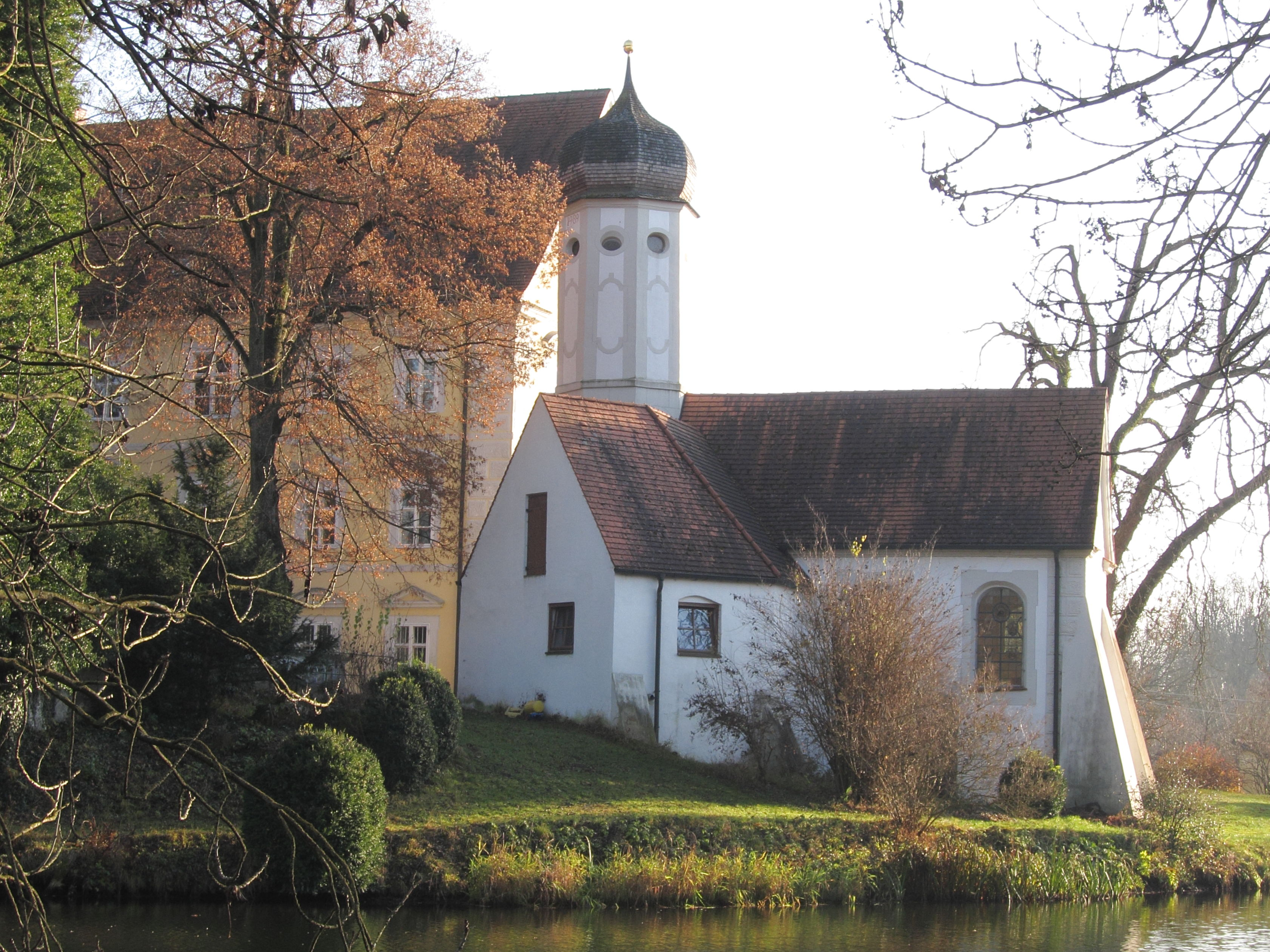 St. Walburga; Schlosskapelle, freistehend mit polygonalem Chorturm, 1658 erneuert.